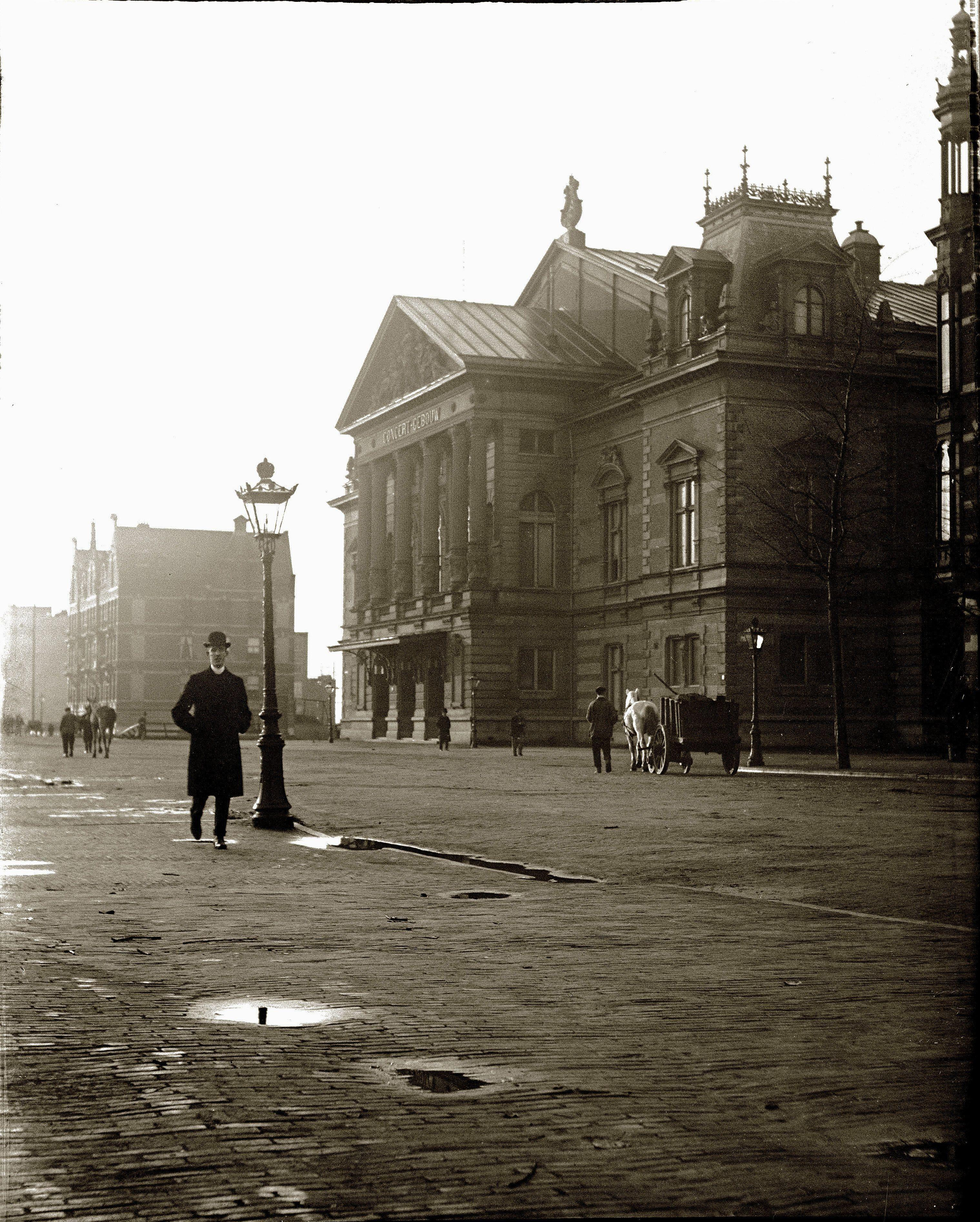 Concertgebouw, Amsterdam. 10 november 1902. Foto. Verblijfplaats onbekend.